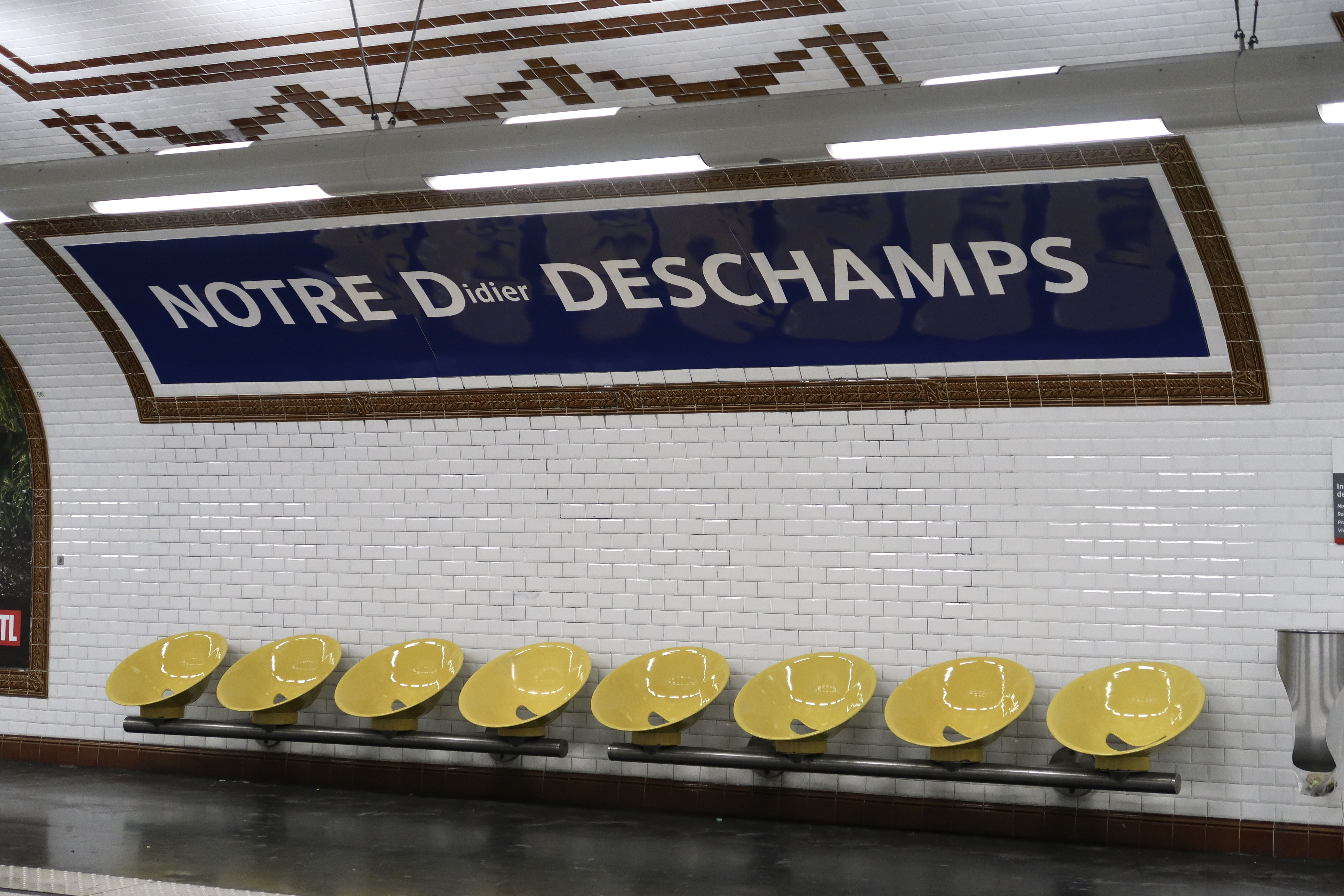 Station de métro parisien Notre-Dame-des-Champs, renommée de façon éphémère Notre-Didier-Deschamps, en hommage au sélectionneur de l'équipe de France de football après la victoire à la coupe du monde de 2018.